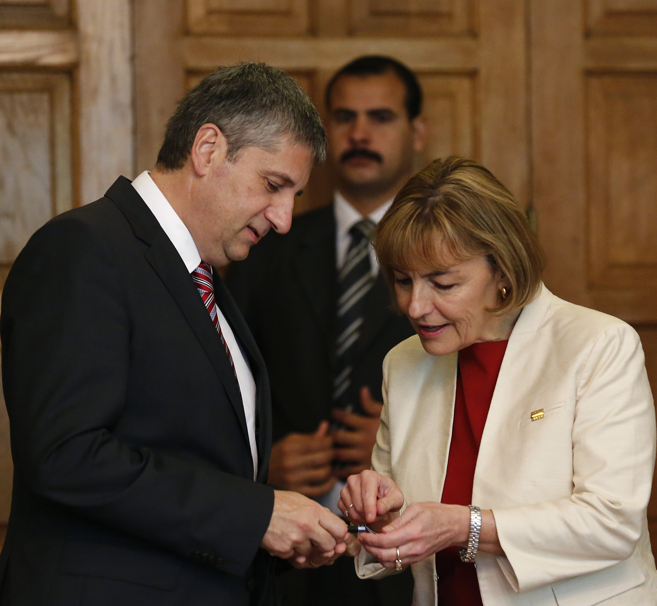 Ministertreffen EU - Arabische Liga, VK Michael Spindelegger im Gespräch mit der kroatischen Aussenministerin Vesna Pusic.